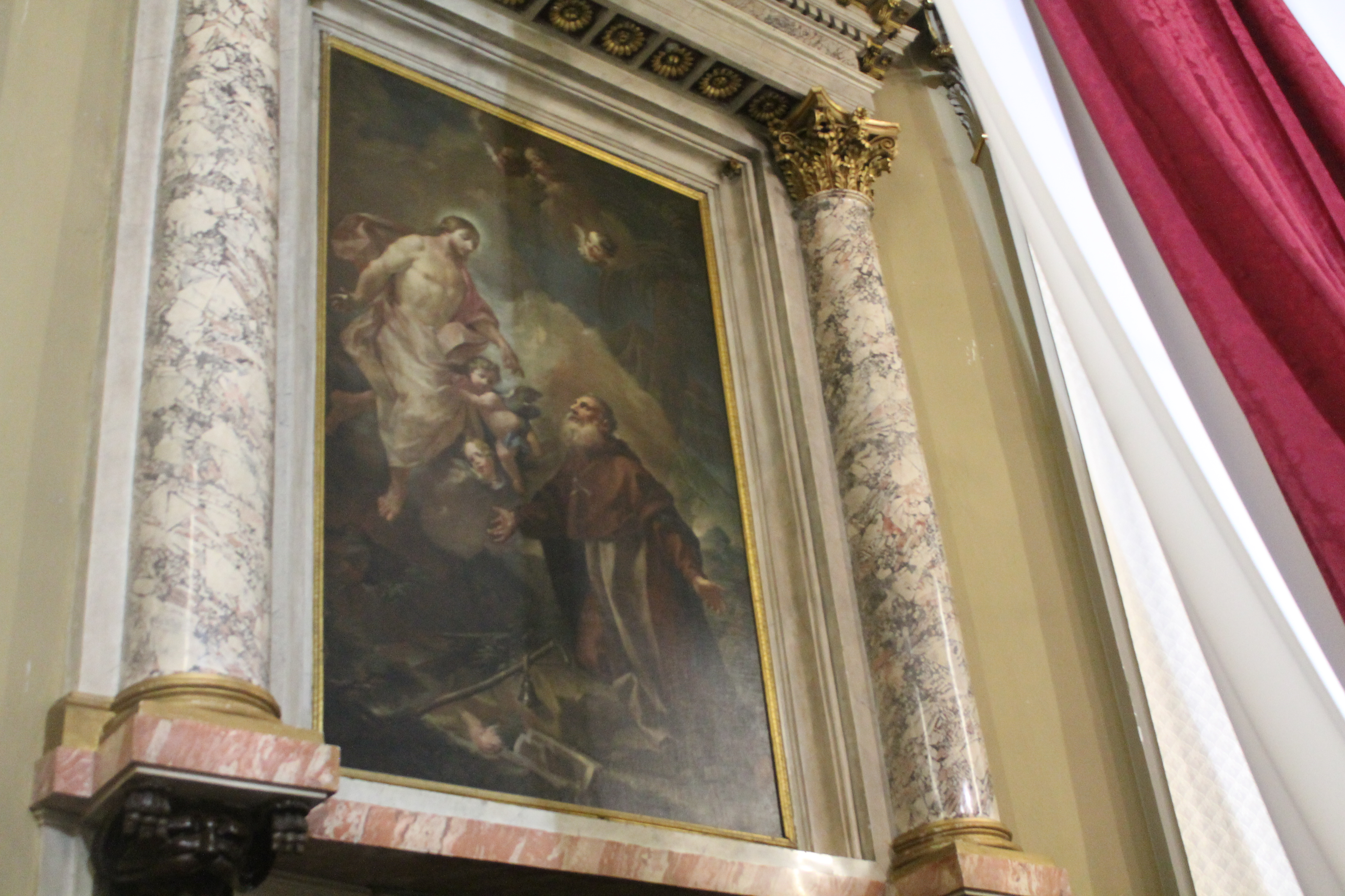 Pala dell'altare della Chiesa Parrocchiale di Castelcovati, raffigurante l'apparizione di Gesù a Sant'Antonio Abate, opera di Sante Cattaneo.